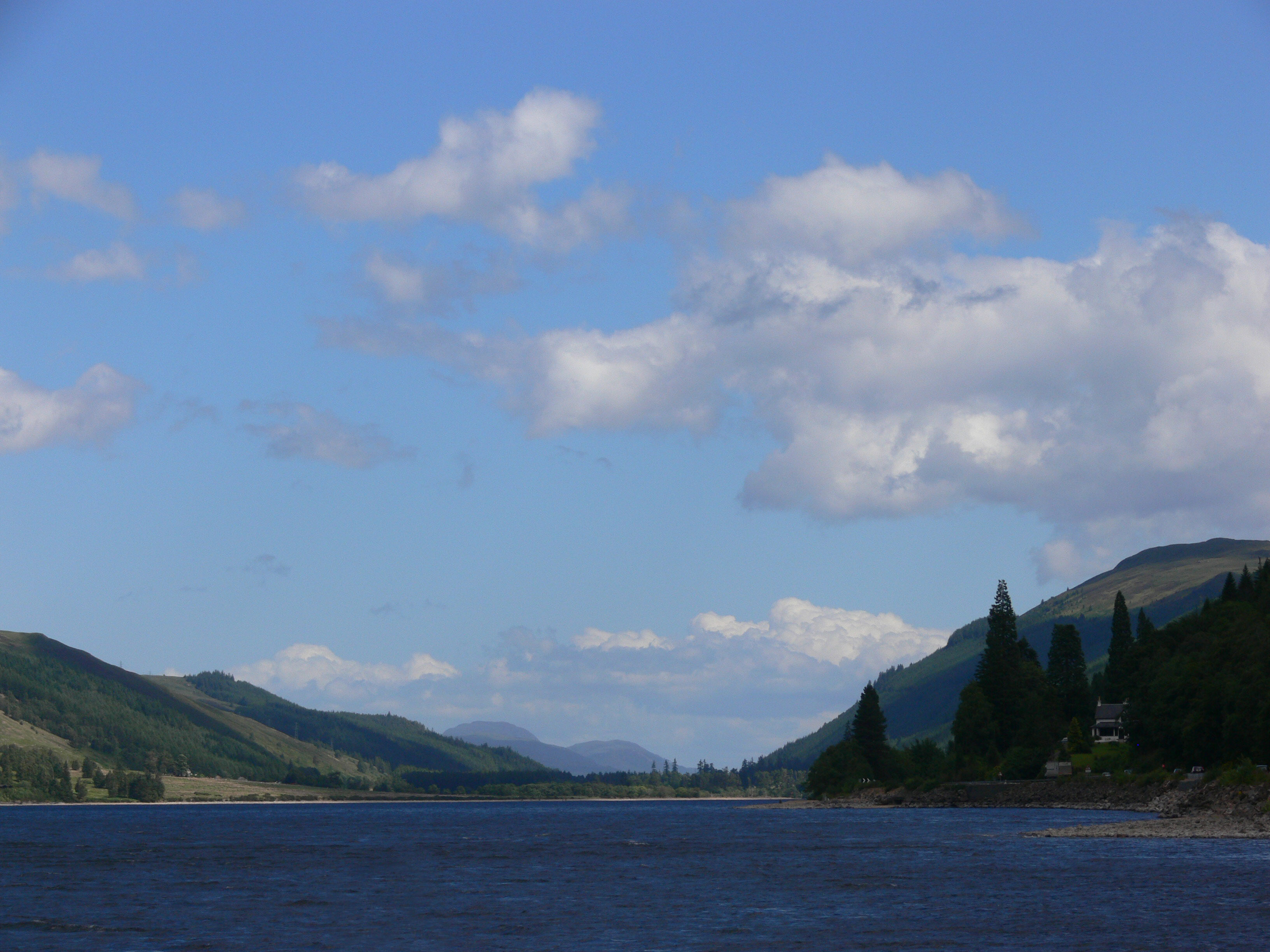 Loch Lochy (Ecosse)